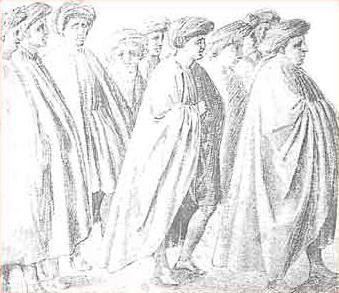 Andrea commodi, copia della sagra di Masaccio (dett.).jpg